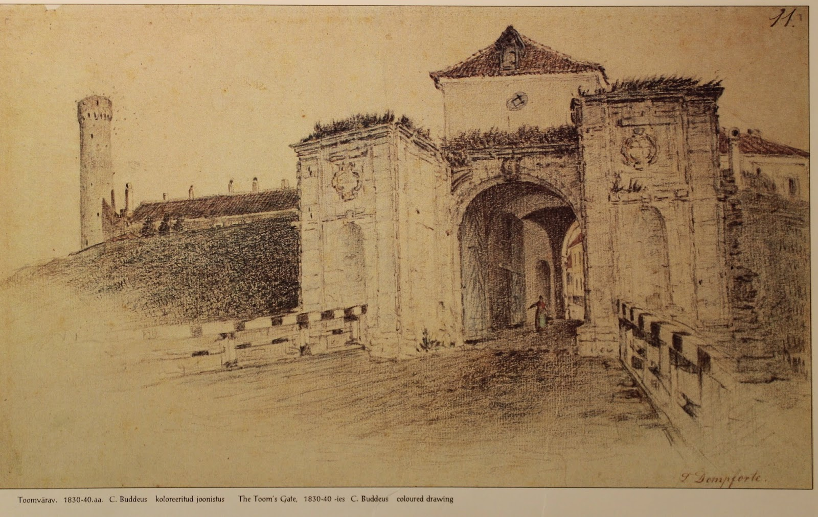 Toomvärav